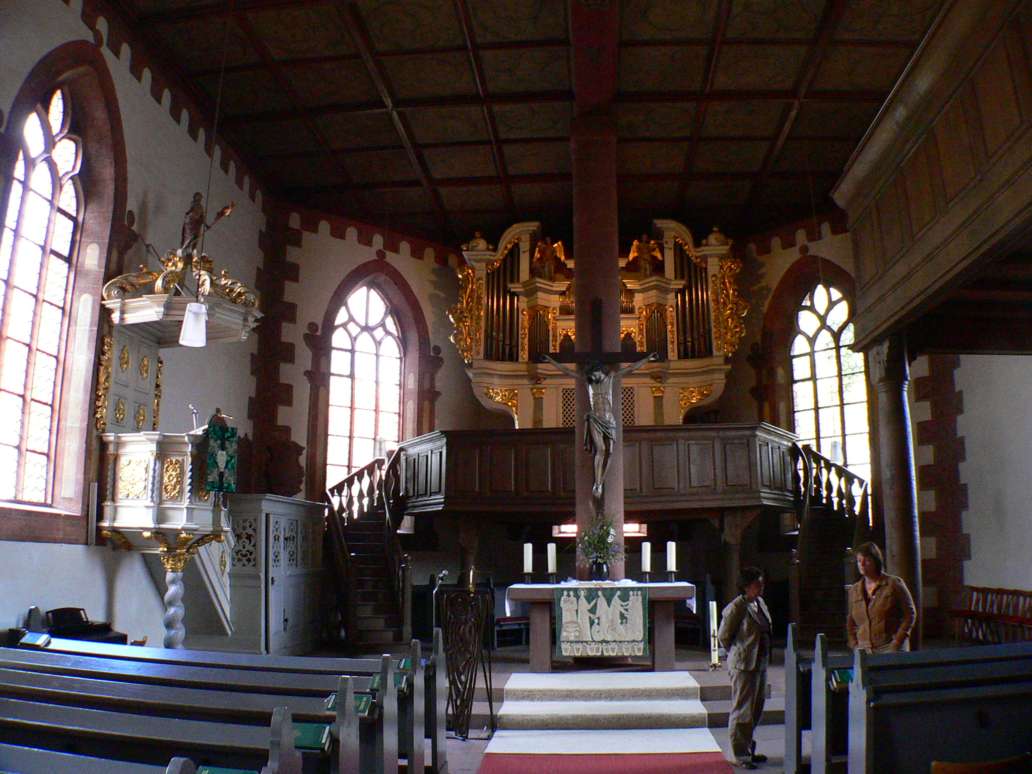 Kloster Höchst, Odenwald, Deutschland: Klosterkirche Innenraum mit Orgel und Altar